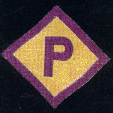 Ein sogenanntes "Polenabzeichen", das aufgrund der "Polenerlasse" vom 8. März 1940 jeder polnische Zwangsarbeiter in Deutschland tragen musste.